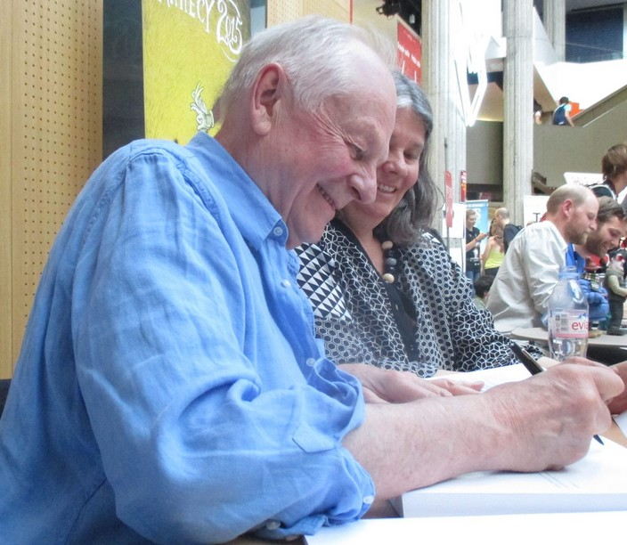 Richard Williams au festival international du film d'animation d'Annecy